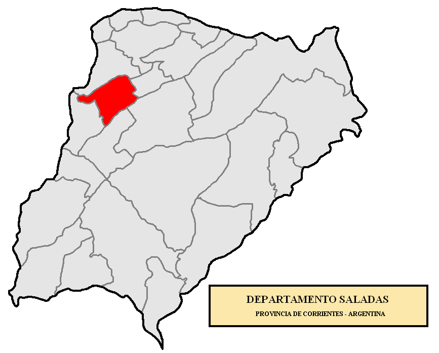 Ubicación de Saladas Localización del Departamento Saladas, en la provincia de Corrientes, Argentina.